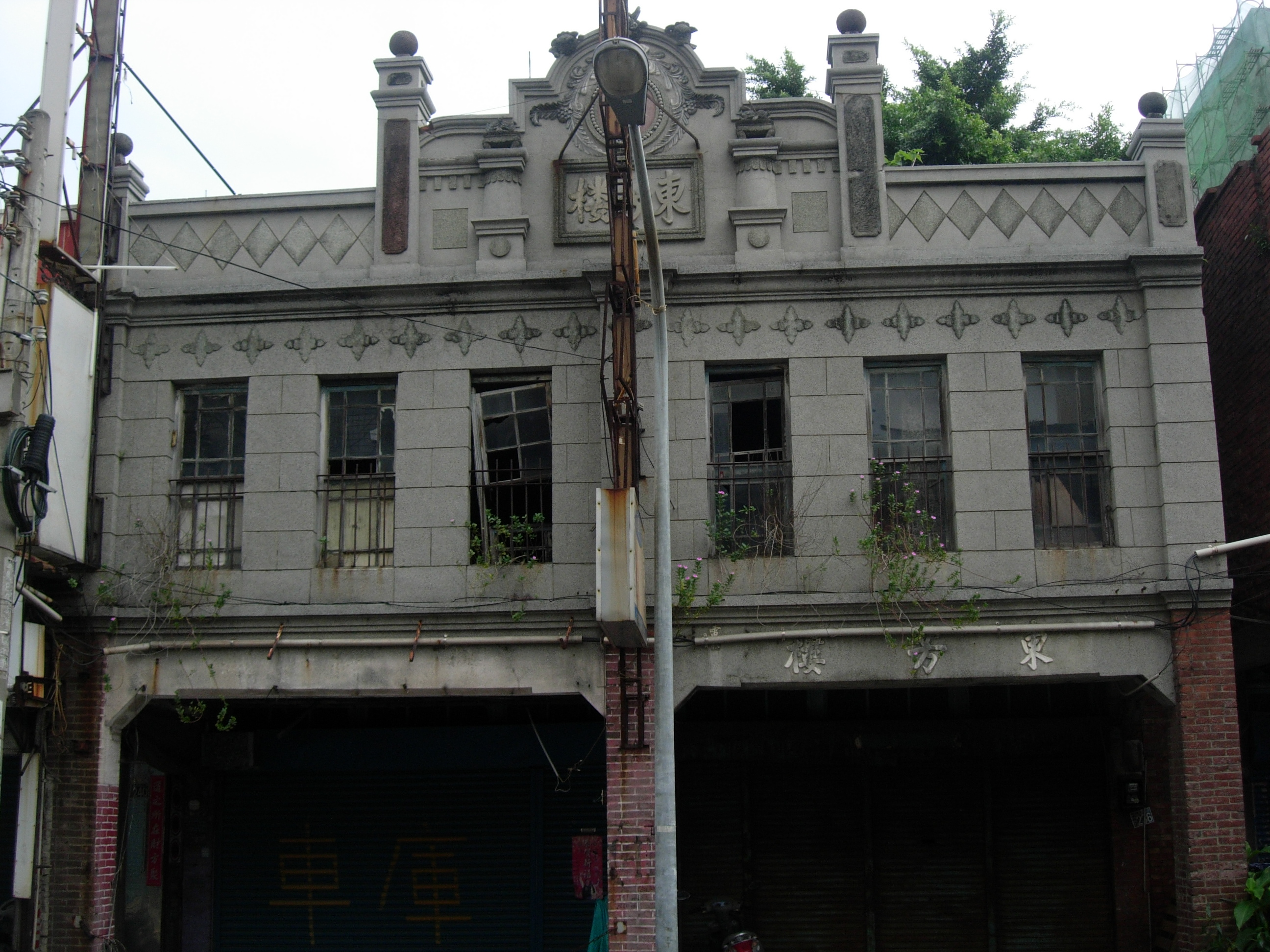 中文（台灣）: 溪湖老街東芳樓。